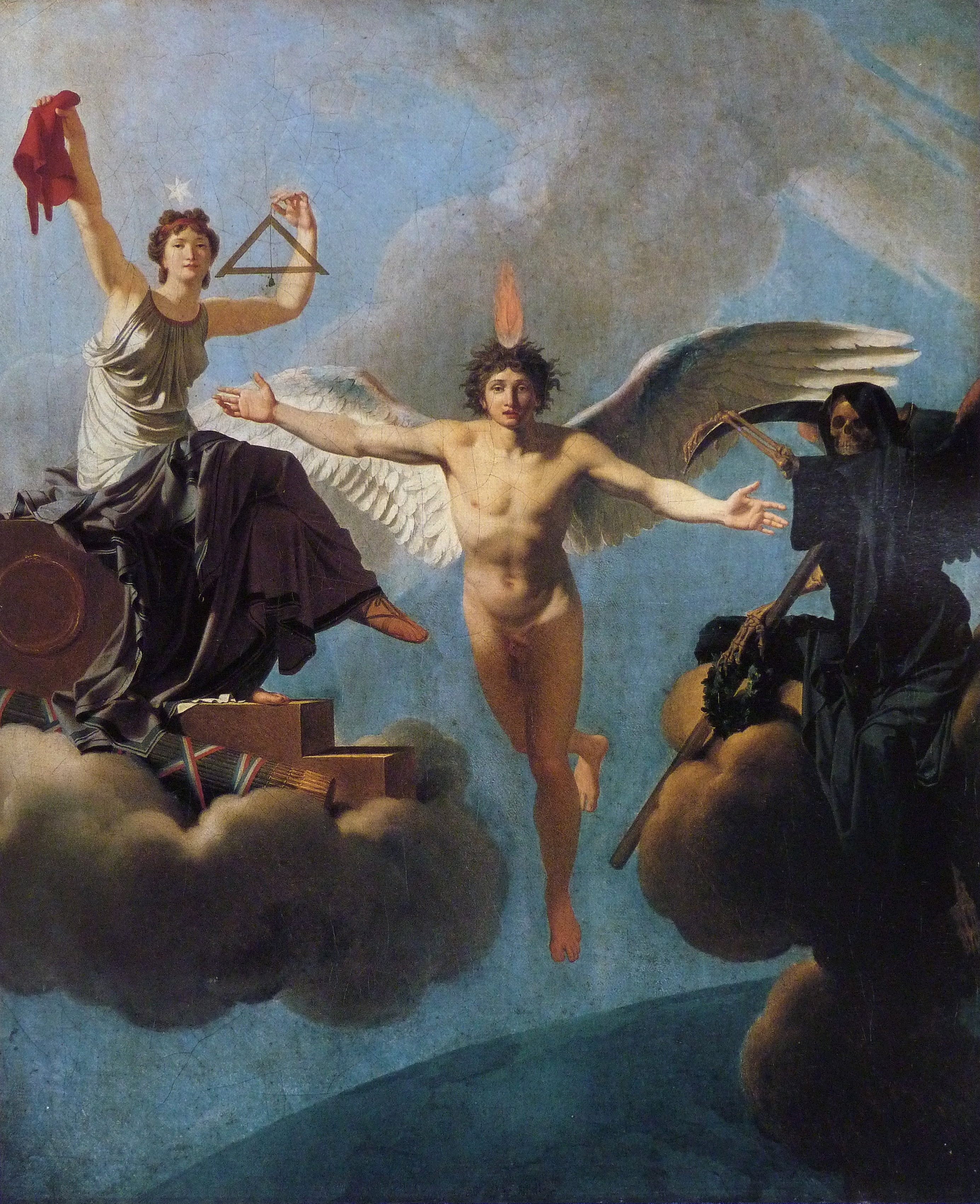 La Liberté ou la Mort, Jean-Baptiste Regnault, Salon de 1795, huile sur toile 60 x 49 cm - Hambourg, Kunsthalle. Publié dans "Aux armes et aux Arts", Adam Biro, 1988.